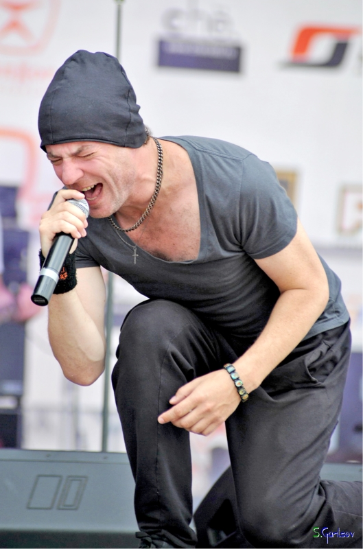 Александр «Михалыч» Красовицкий. Animal Джаz